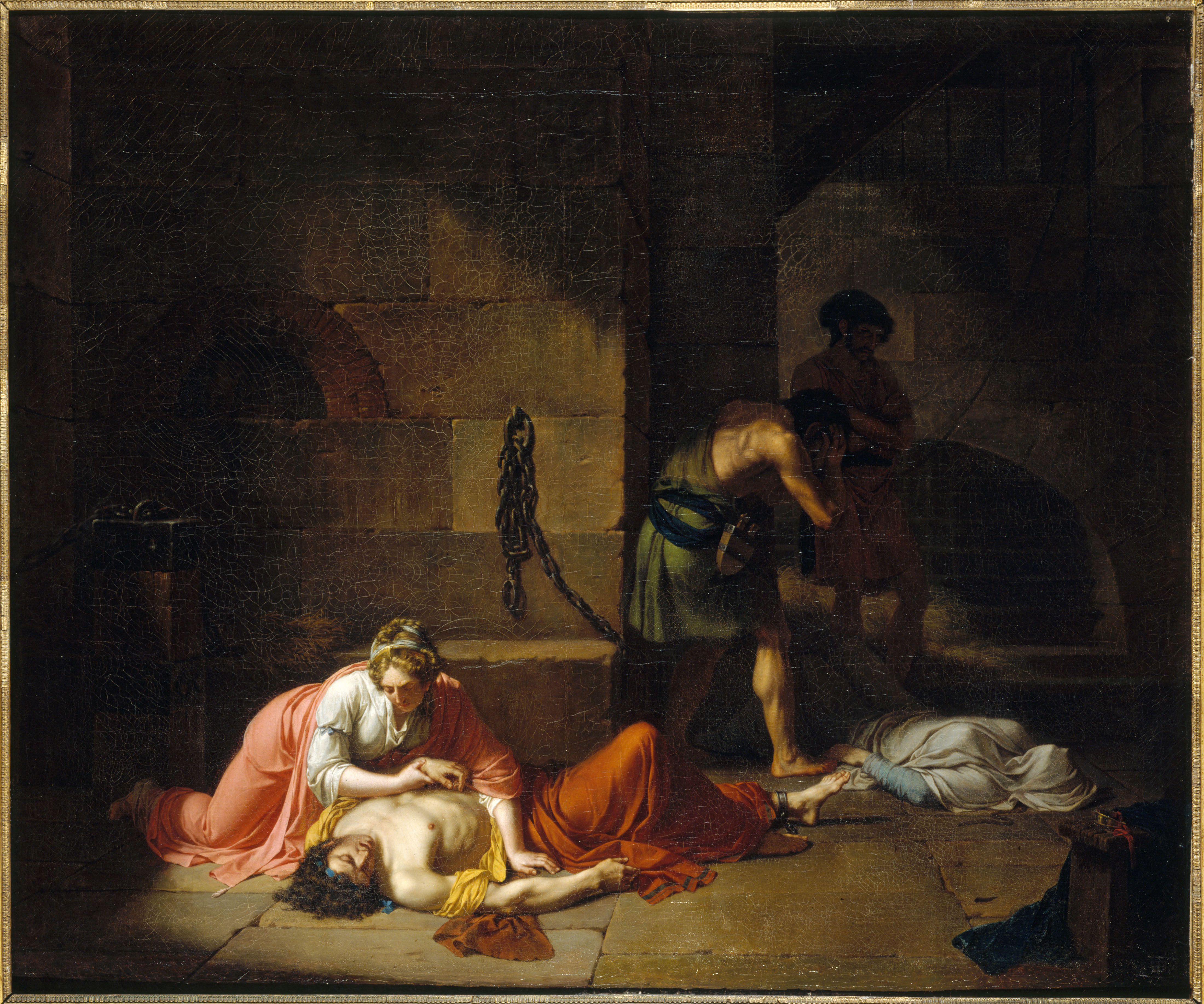 Nicolas-André Monsiau (1754-1837). "La mort d'Agis", 1789 (Agis IV, roi de Sparte, 244-241 av.J.-C.). Huile sur toile. Musée des Beaux-Arts de la Ville de Paris, Petit Palais.